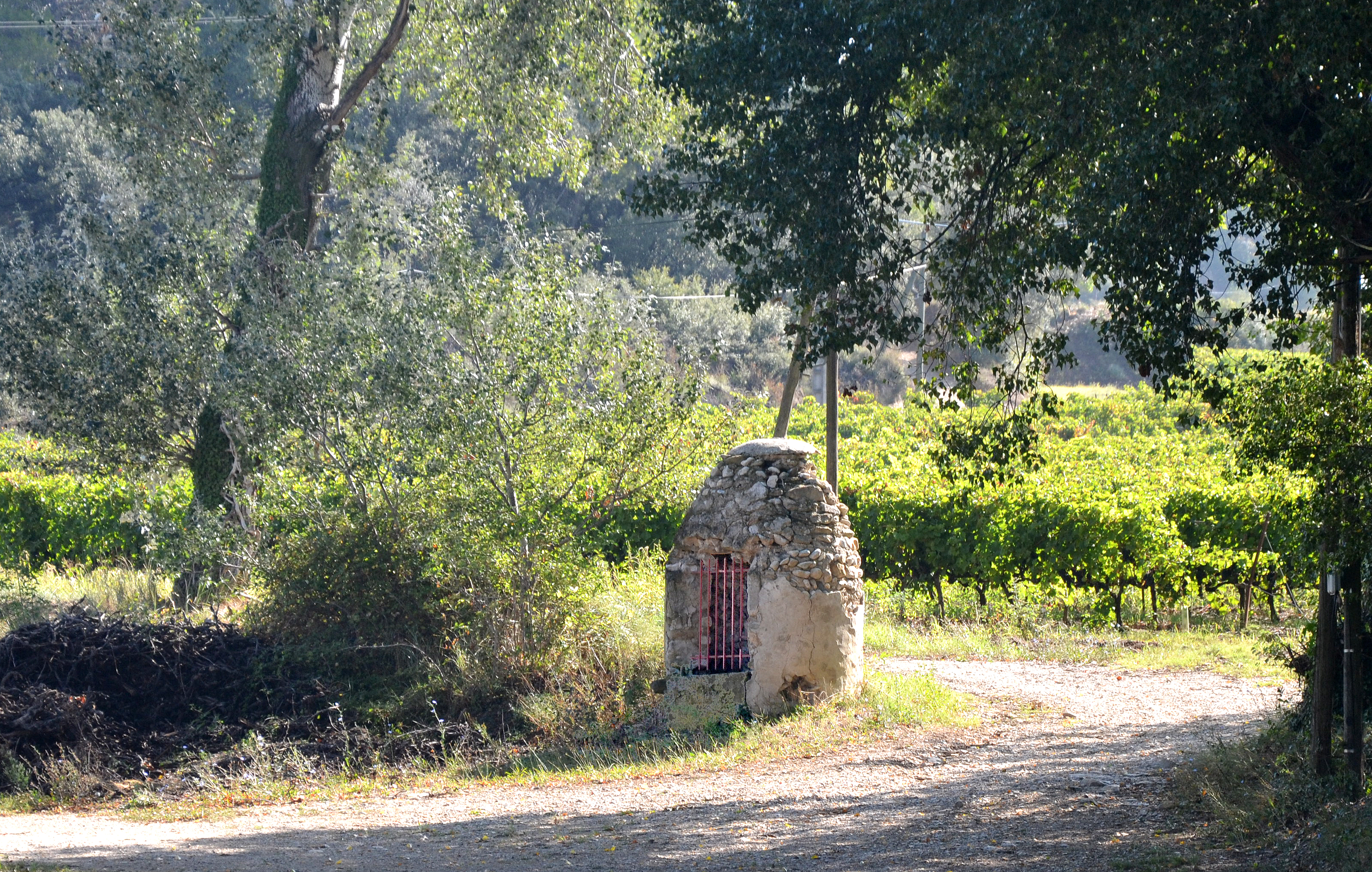 puits de pierre